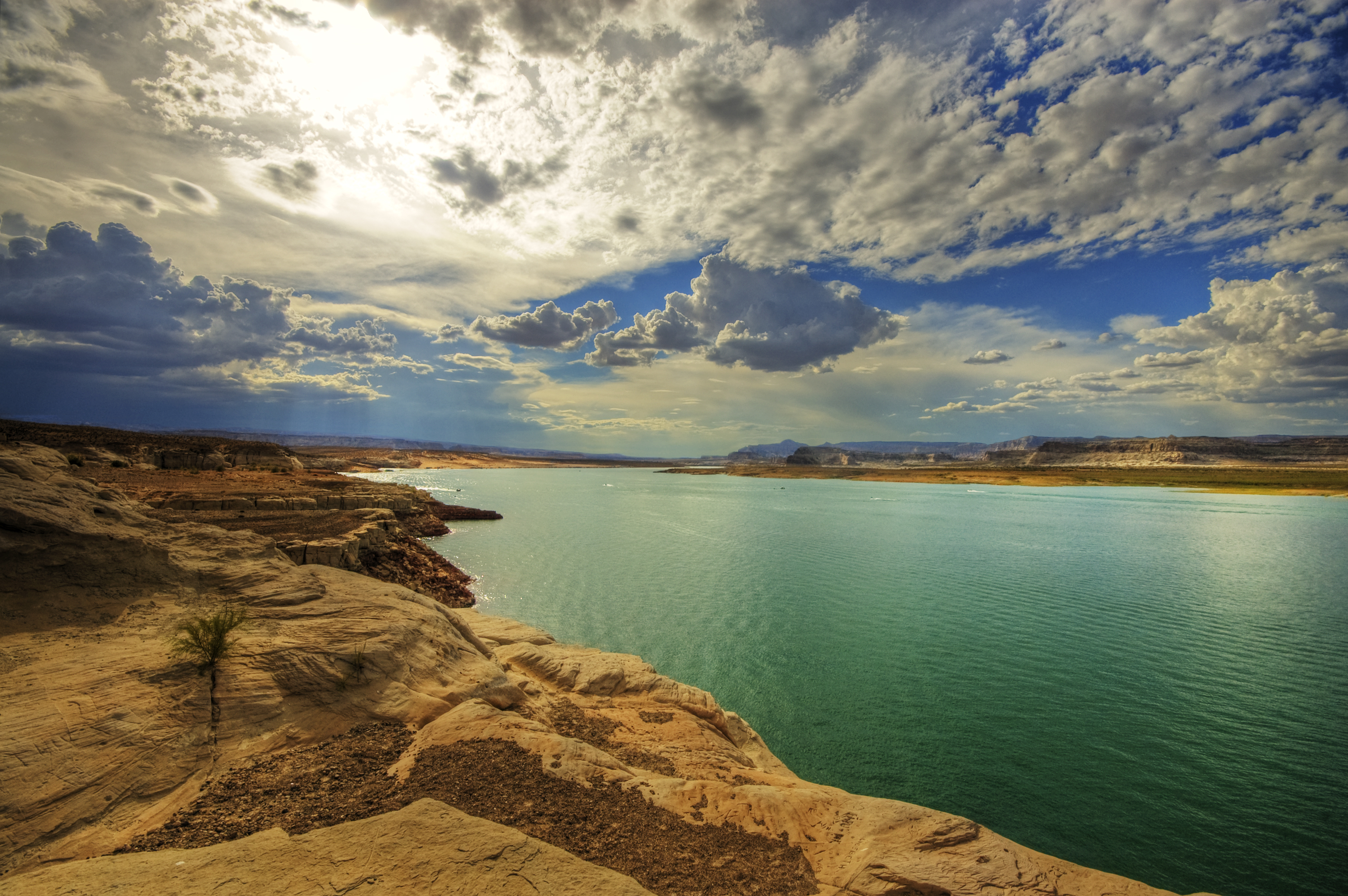 Lake Powell